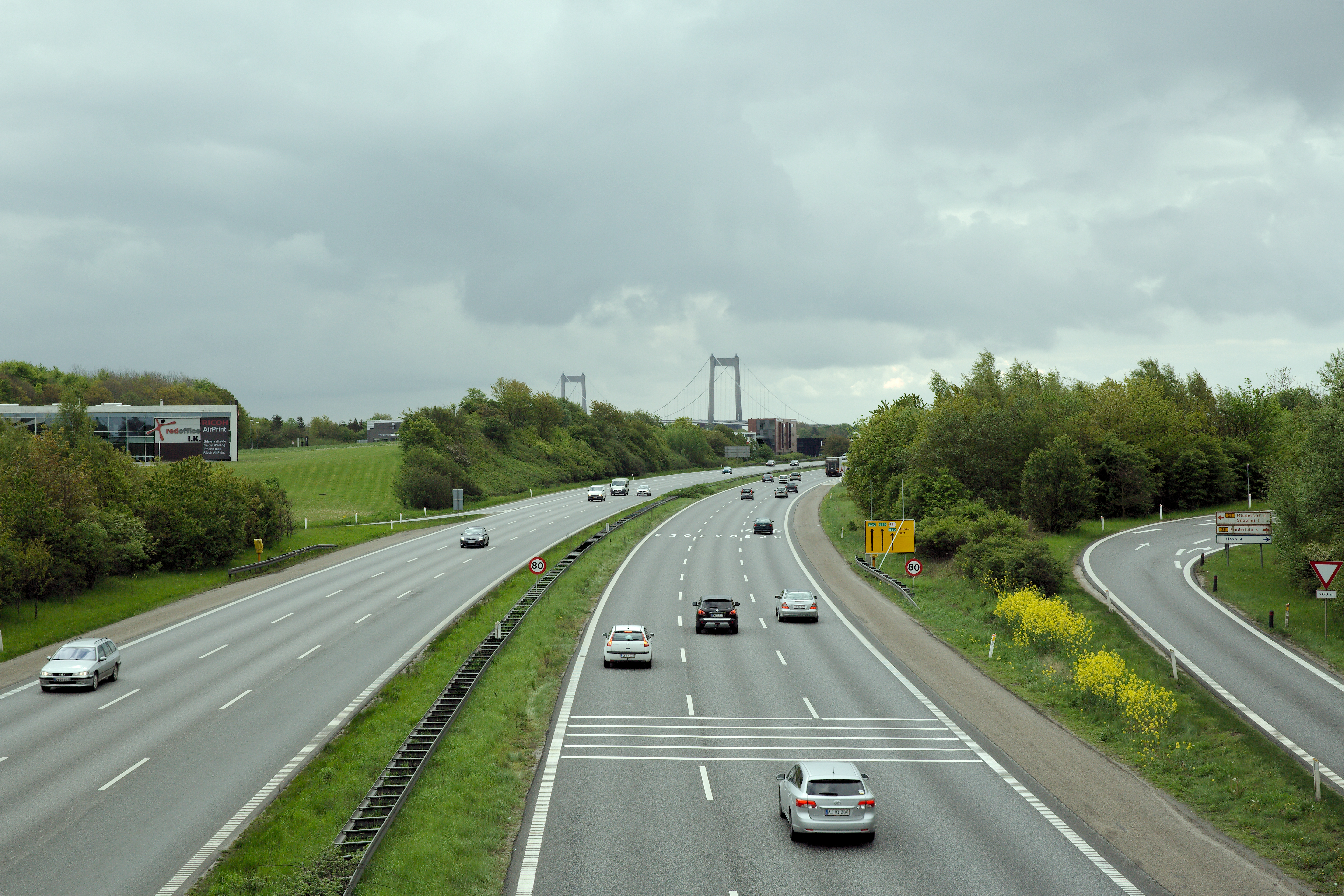 Østjyske Motorvej ved Fredericia retning mod Lillebæltsbroen